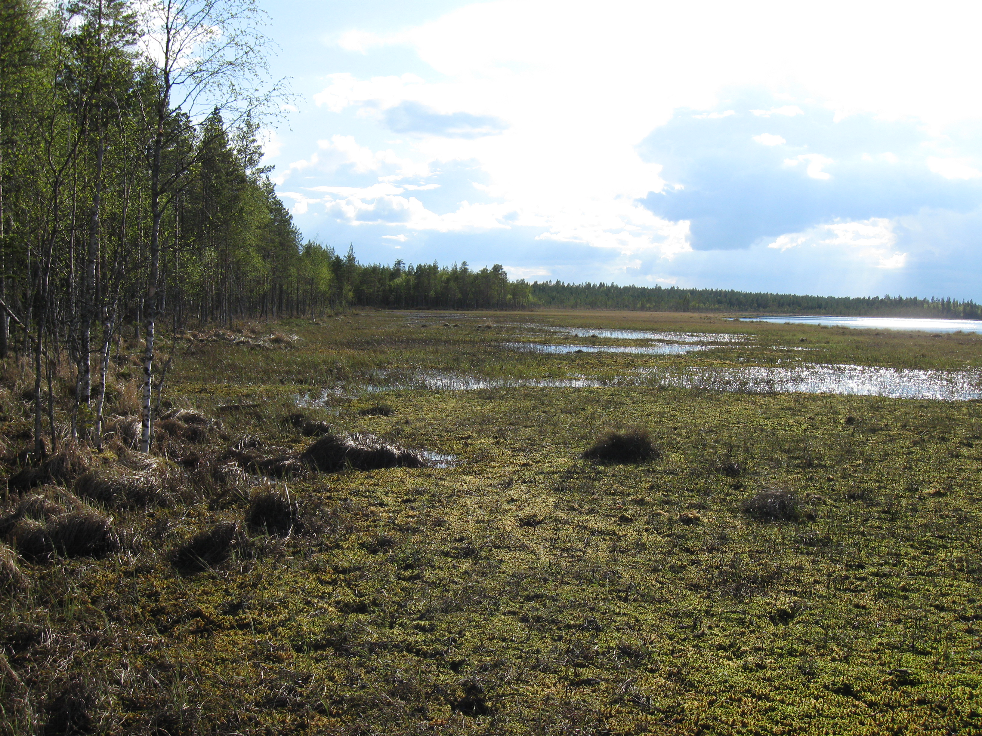 Pikku Olvasjärven soistunutta rantaa Utajärven Juorkunassa.